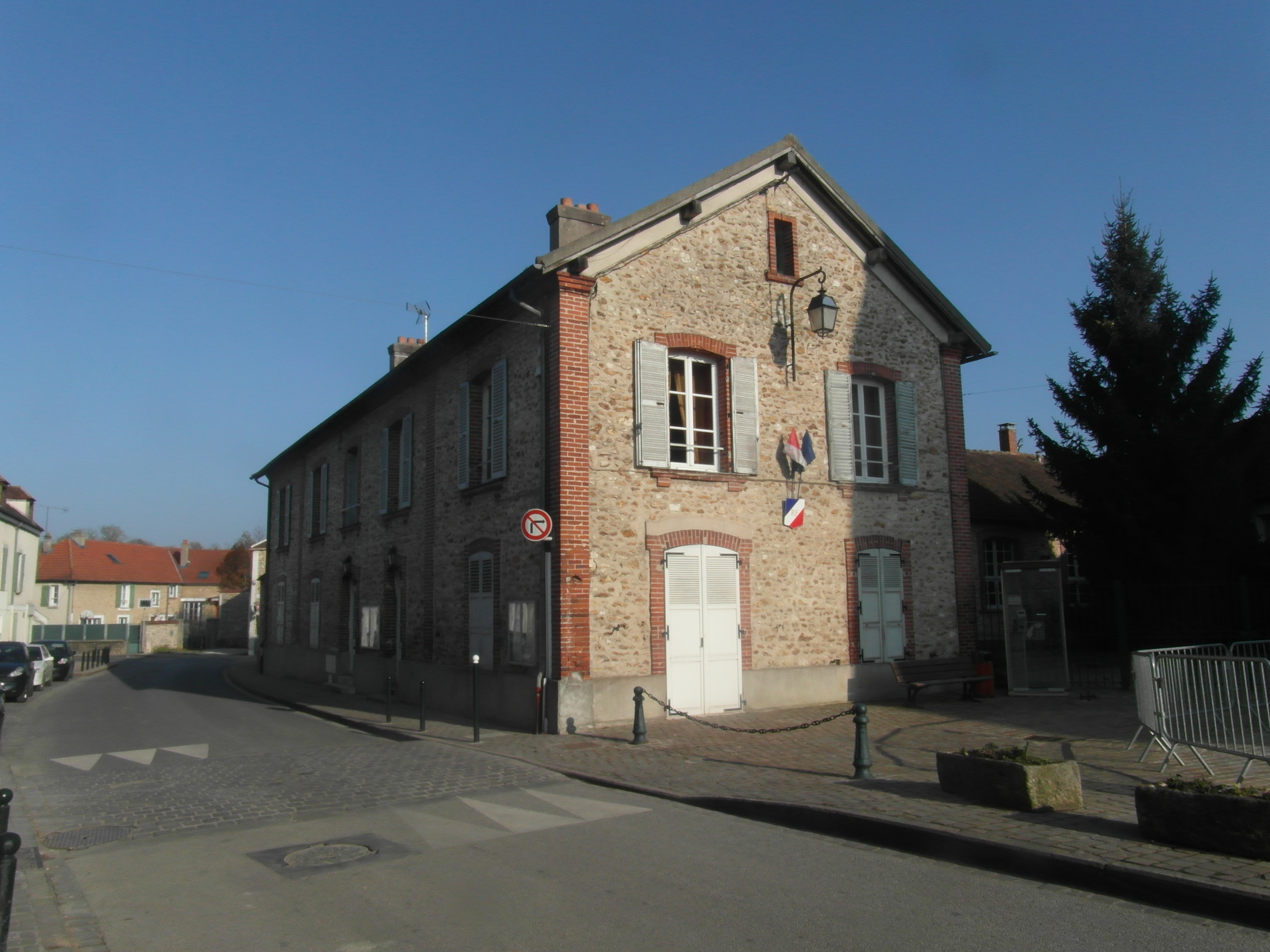 Mairie de Soignolles-en-Brie (Seine-et-Marne)